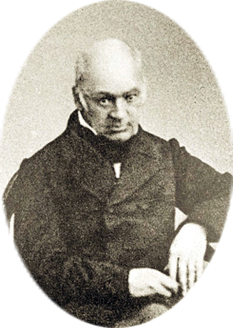 Sabler Vasiliy Feodorovich